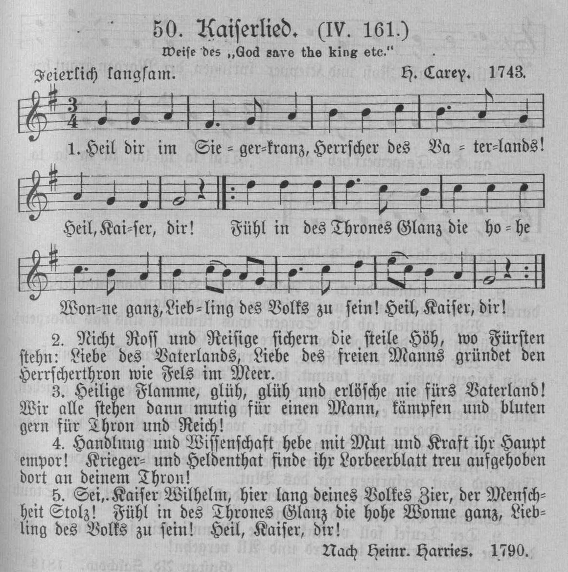 Kaiserlied in Das Allgemeine Deutsche Kommersbuch